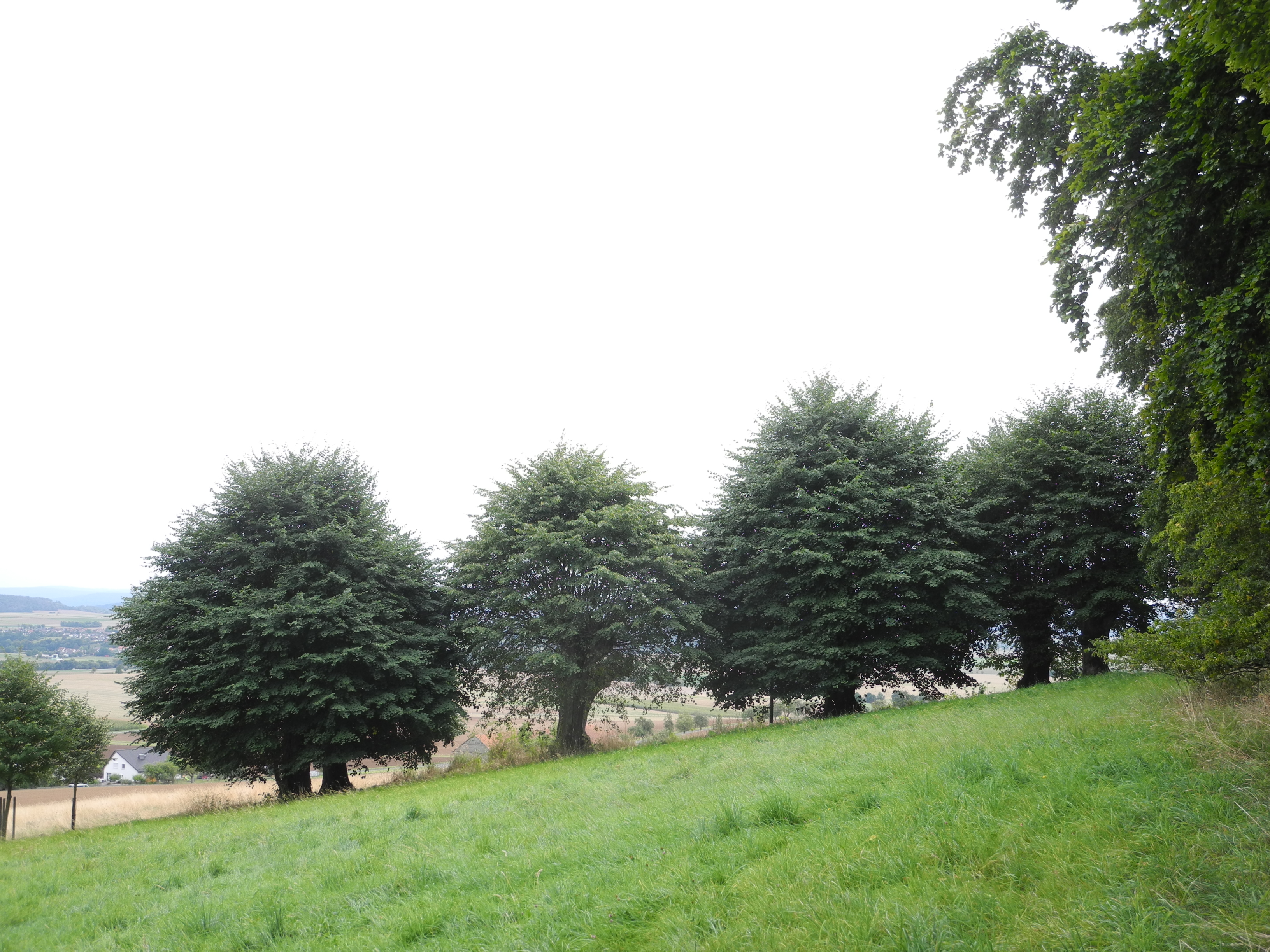 Allee der Kopflinden (Tilia) im Schlosspark Riede, Hessen, Deutschland. Blick von Nordwesten